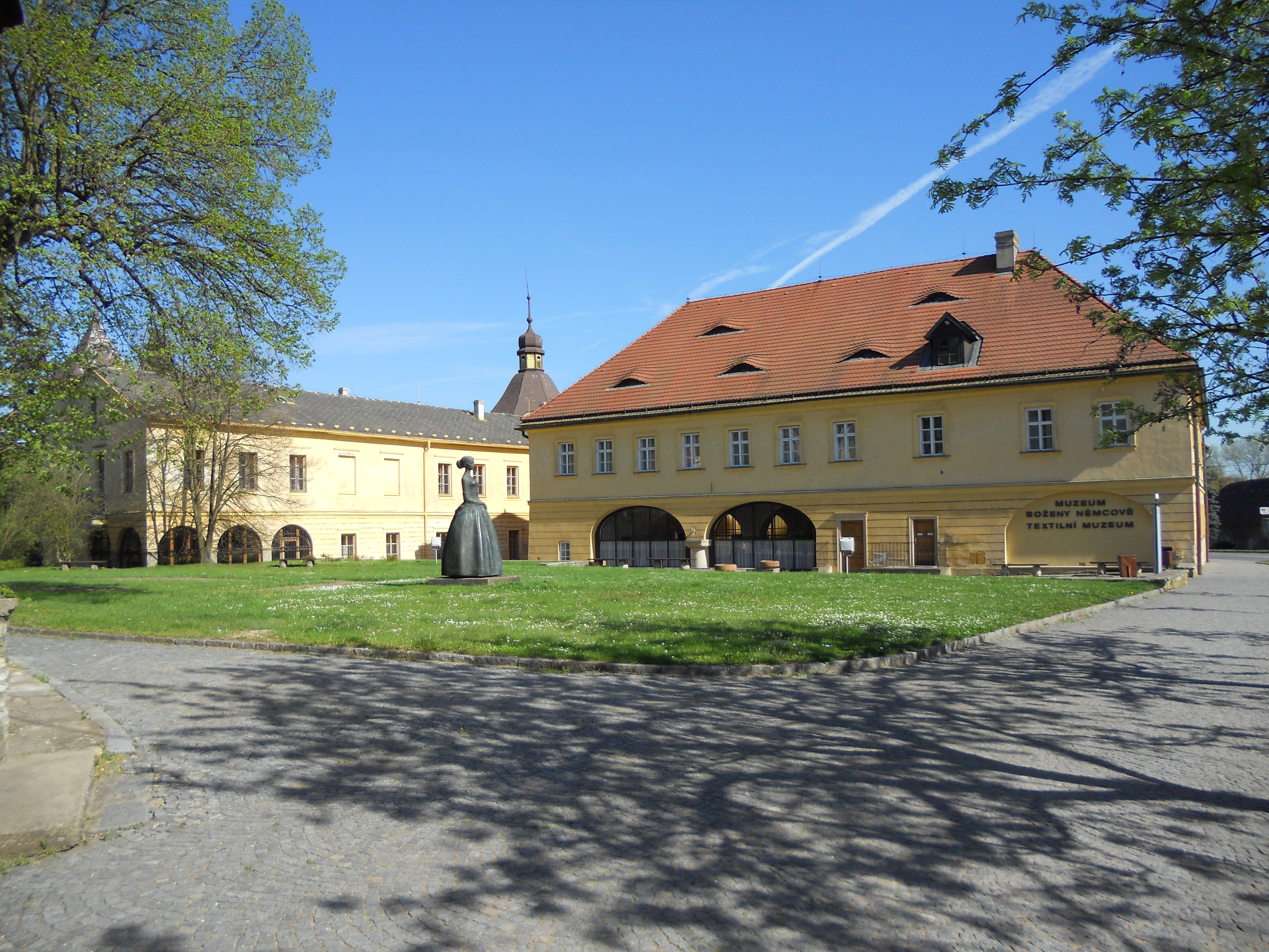 Muzeum Boženy Němcové a Textilní muzeum - Česká Skalice